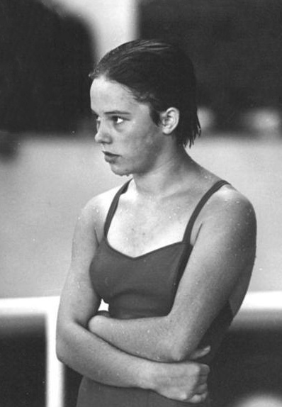 Zentralbild-Kohls Stu-Qu 21.8.1964 Die Olympia-Ausscheidungen... der Wasserspringer wurden am 20.8.1964 im Agrippa-Bad von Köln mit den Kämpfen im Kunstspringen der Damen und im Turmspringen der Herren fortgesetzt. UBz.: Christiane Lanzke beobachten aufmerksam das Einspringen der westdeutschen Kontrahenten.